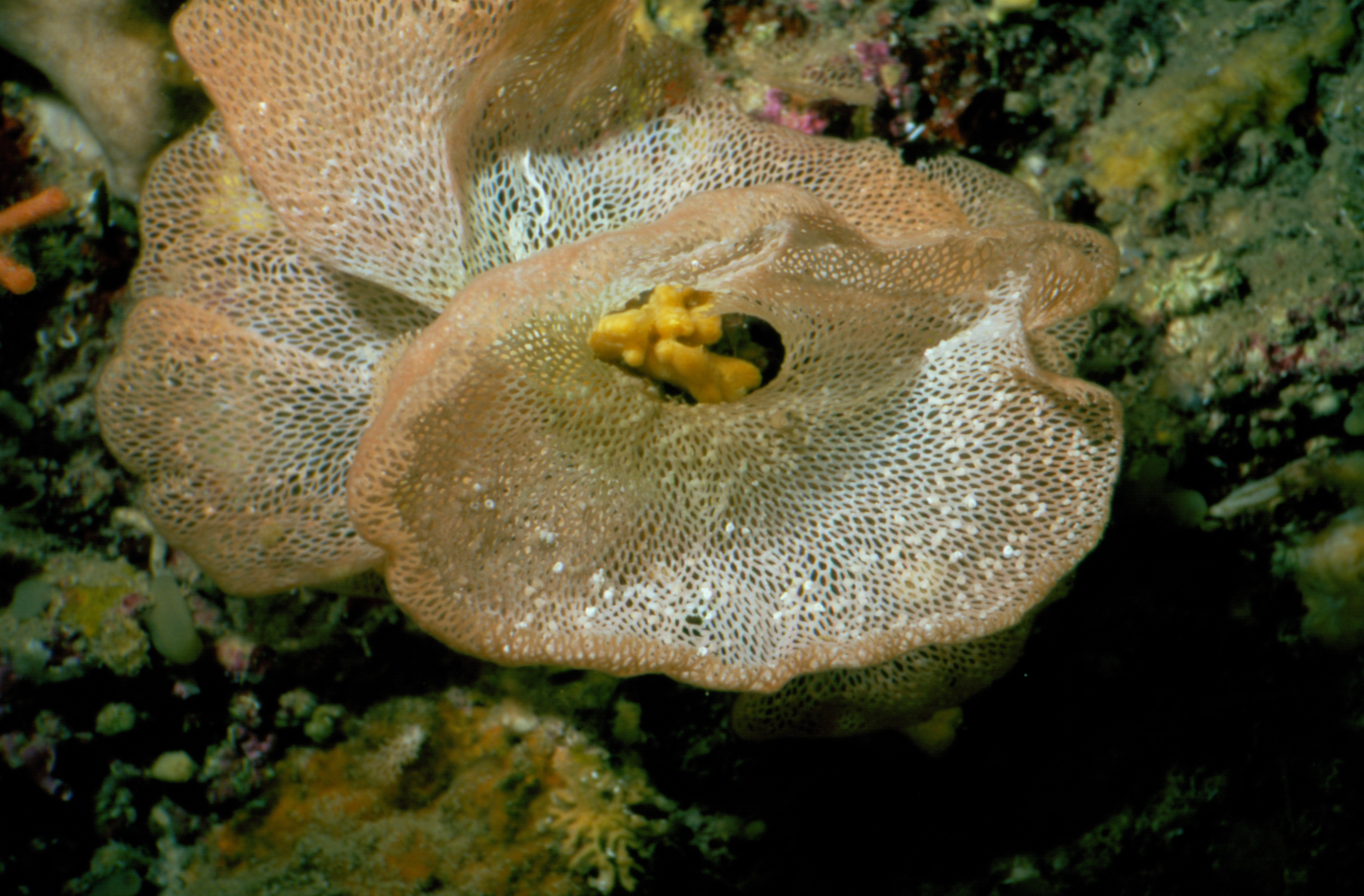 Große Neptunschleierkolonie